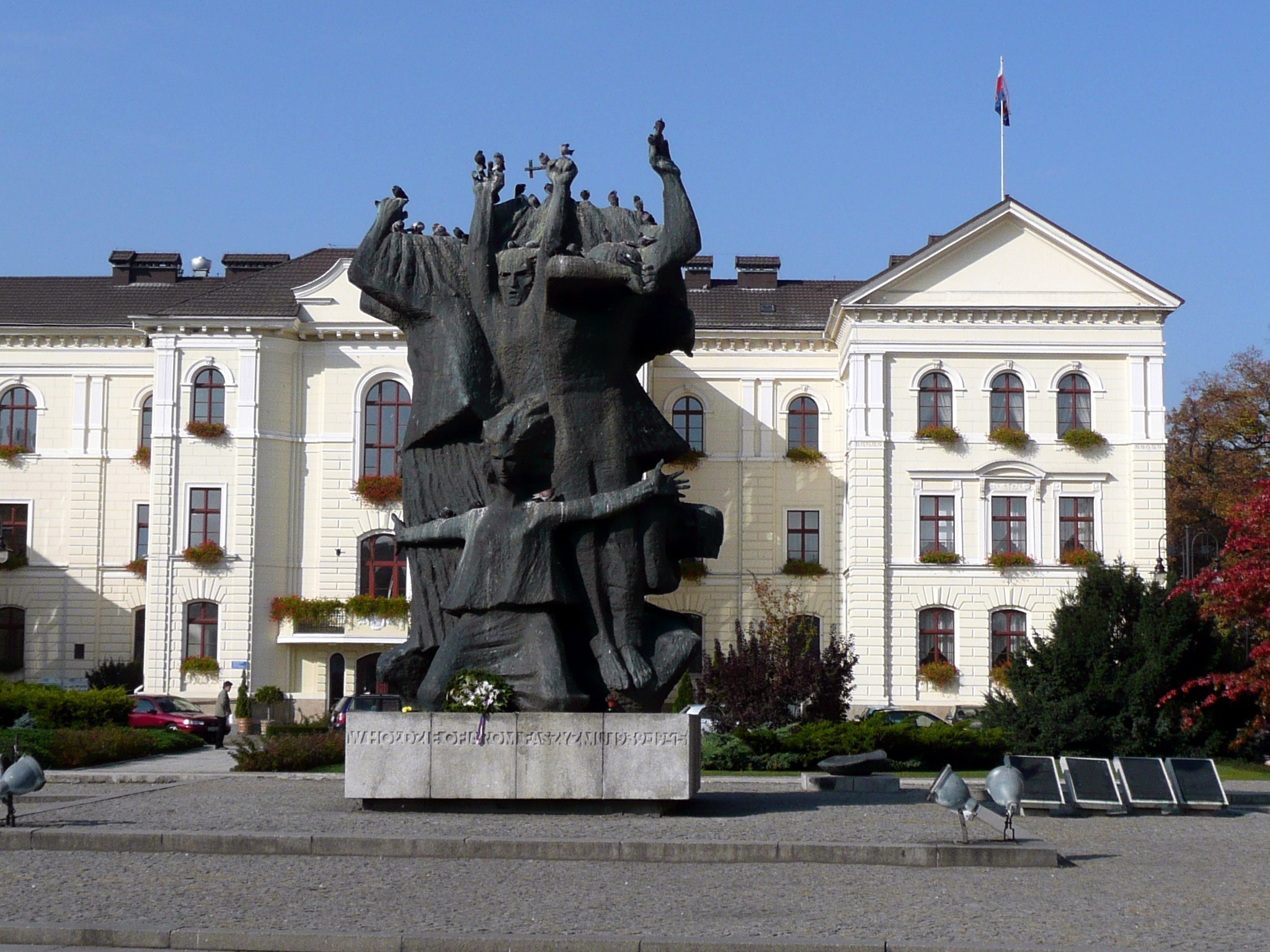 Bydgoszcz, Stary Rynek